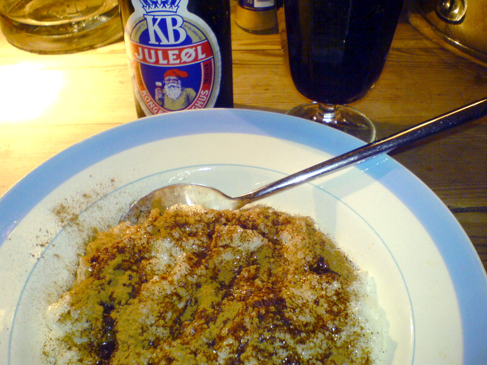 Risengrød og nisseøl